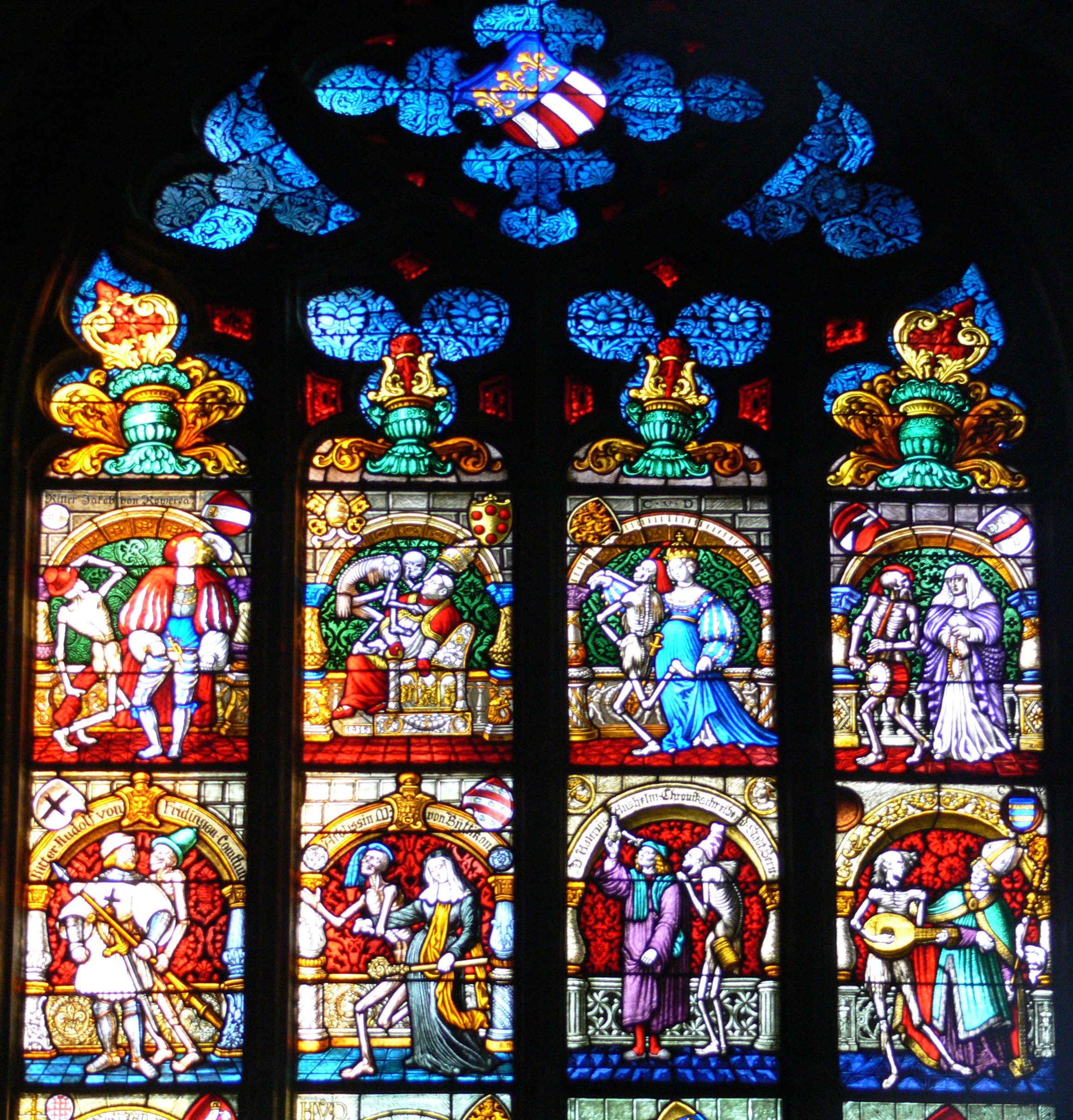 Berner Münster Totentanzfenster von Eduard von Rodt († 1926) nach Niklaus Manuels Totentanz, 1918